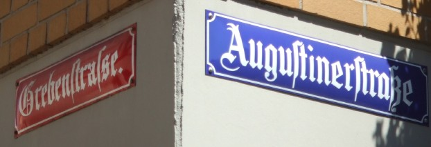 Rote und blaue Straßenschilder in Mainz; Blaue Straßenschilder weisen auf Straßen hin, die parallel zum Fluss verlaufen. Rote Straßenschilder weisen auf Straßen hin, die auf den Fluss zulaufen. Die „Grebenſtraſse“ (links) ist nach den Regeln der gebrochenen Schrift falsch geschrieben, die Inschrift sollte „Grebenſtraße“ lauten (wie rechts).